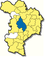 Lage der Gemeinde im Landkreis Kelheim